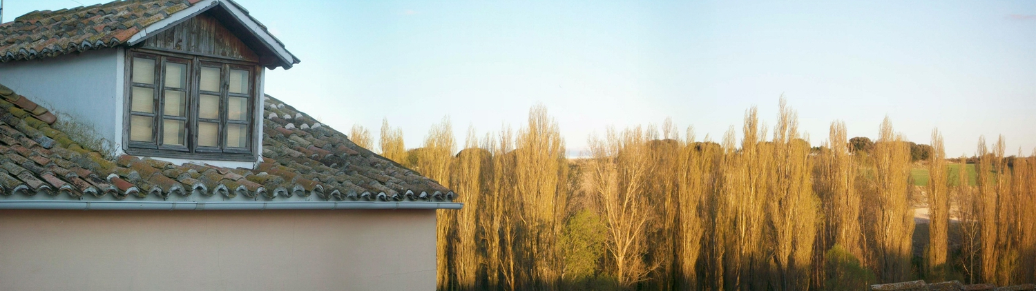 primeras hojas